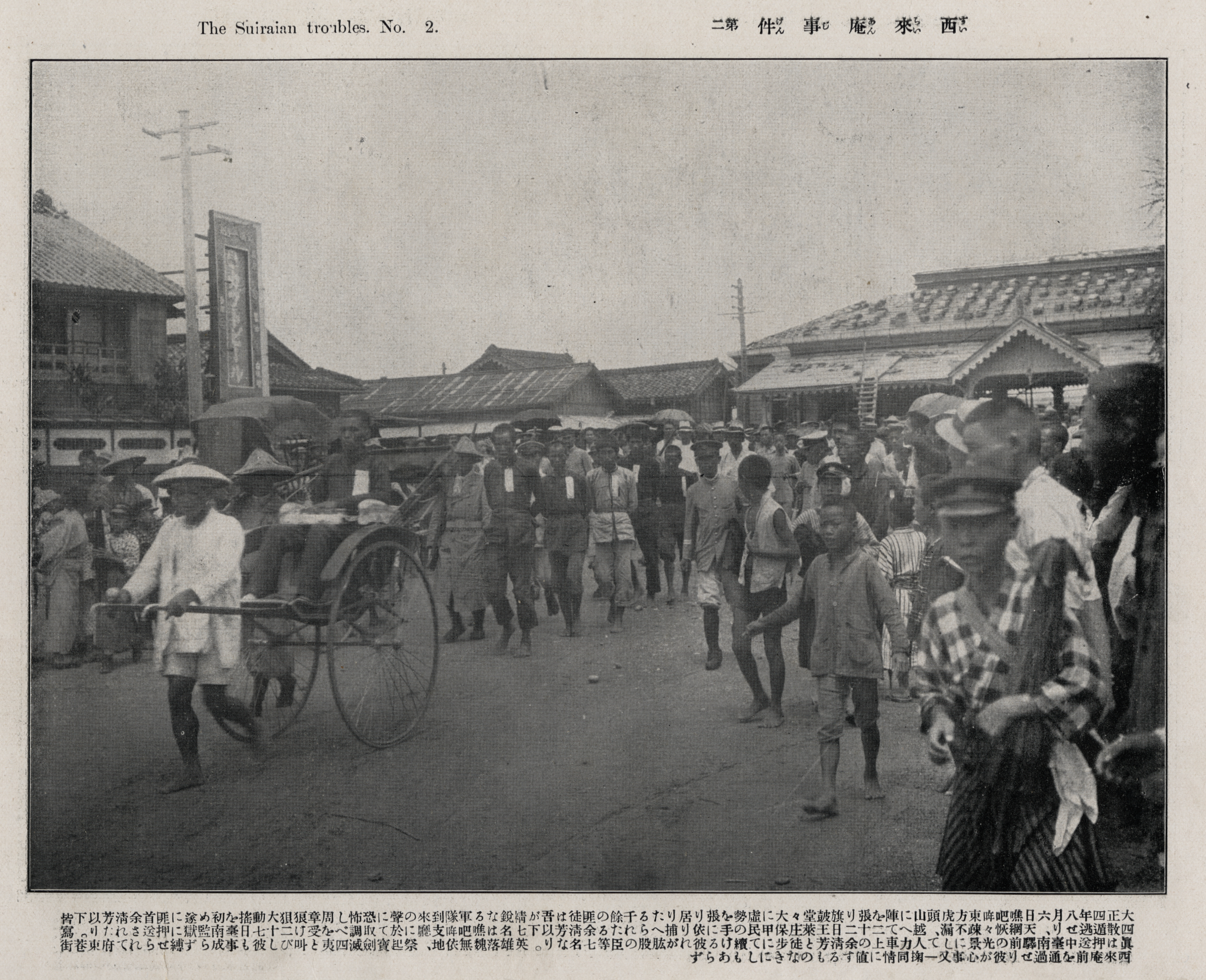 1915年（日大正4年）8月 西來庵事件後， 余清芳等人被押解經過台南火車站站前的老照片 西來庵事件又稱噍吧哖事件，是發生於1915年的武力抗日事件， 領導人為余清芳、羅俊、江定等人 余清芳應該就是老照片中，最前方坐在人力車上的那位 右後方的建築為第一代台南火車站，屋頂上擺滿瓦片，旁邊還立了梯子， 看起來似乎正在進行什麼工事 延伸閱讀：西來庵事件